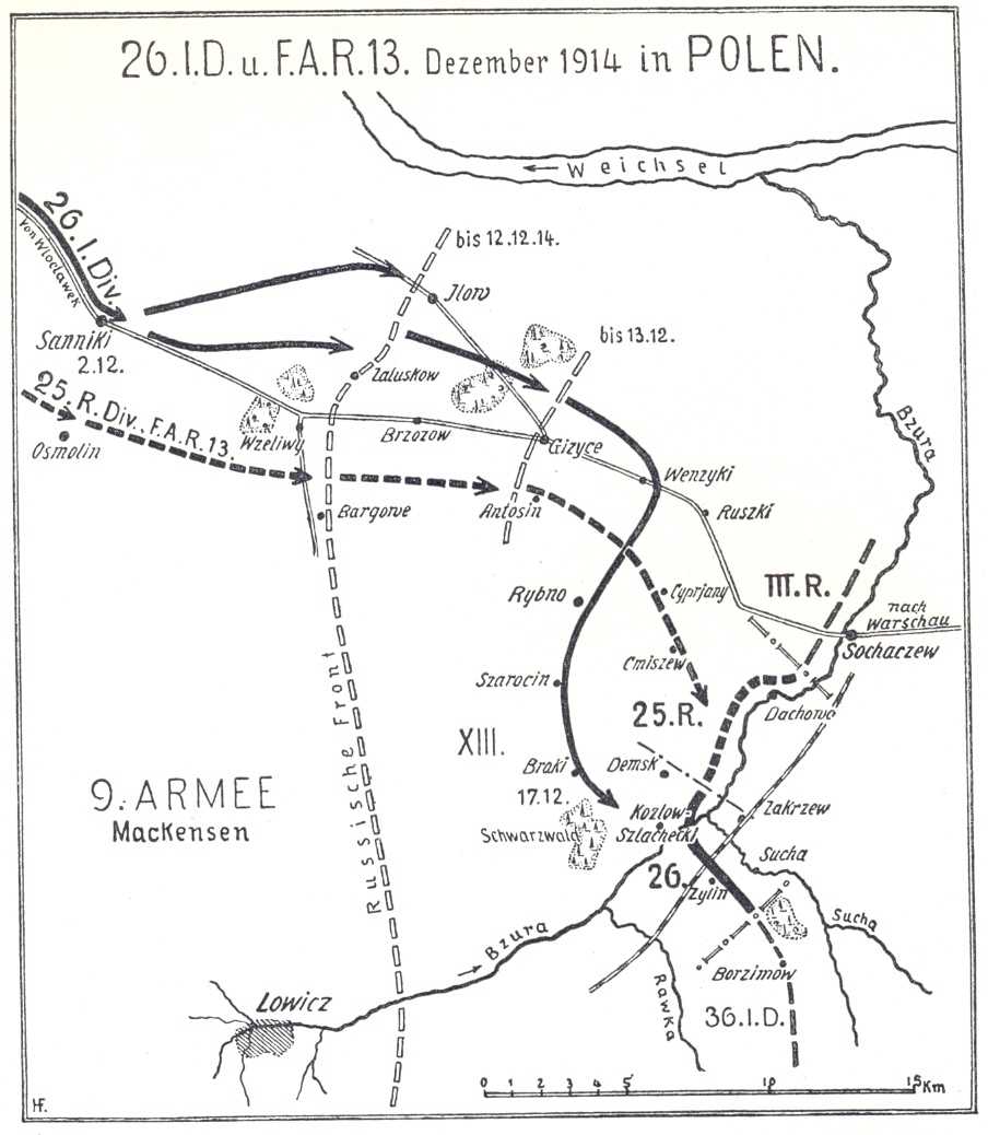 Karte Seite 31: 26. Infanterie-Division und Feldartillerie-Regiment 13 Polen 1914